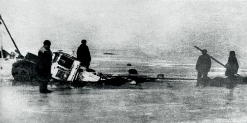 Дорога жизни. Провал под лёд